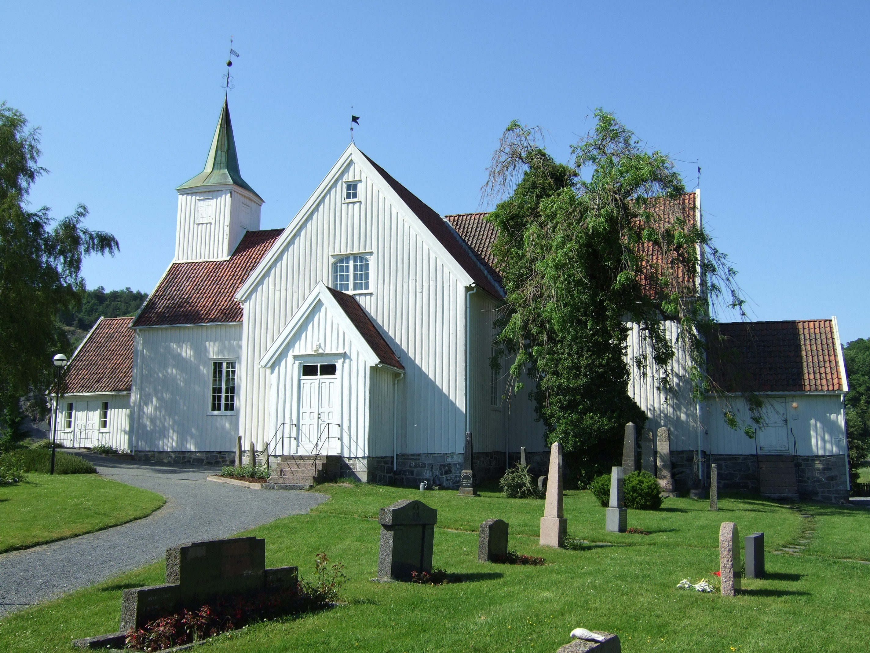 Landvik church, Norway